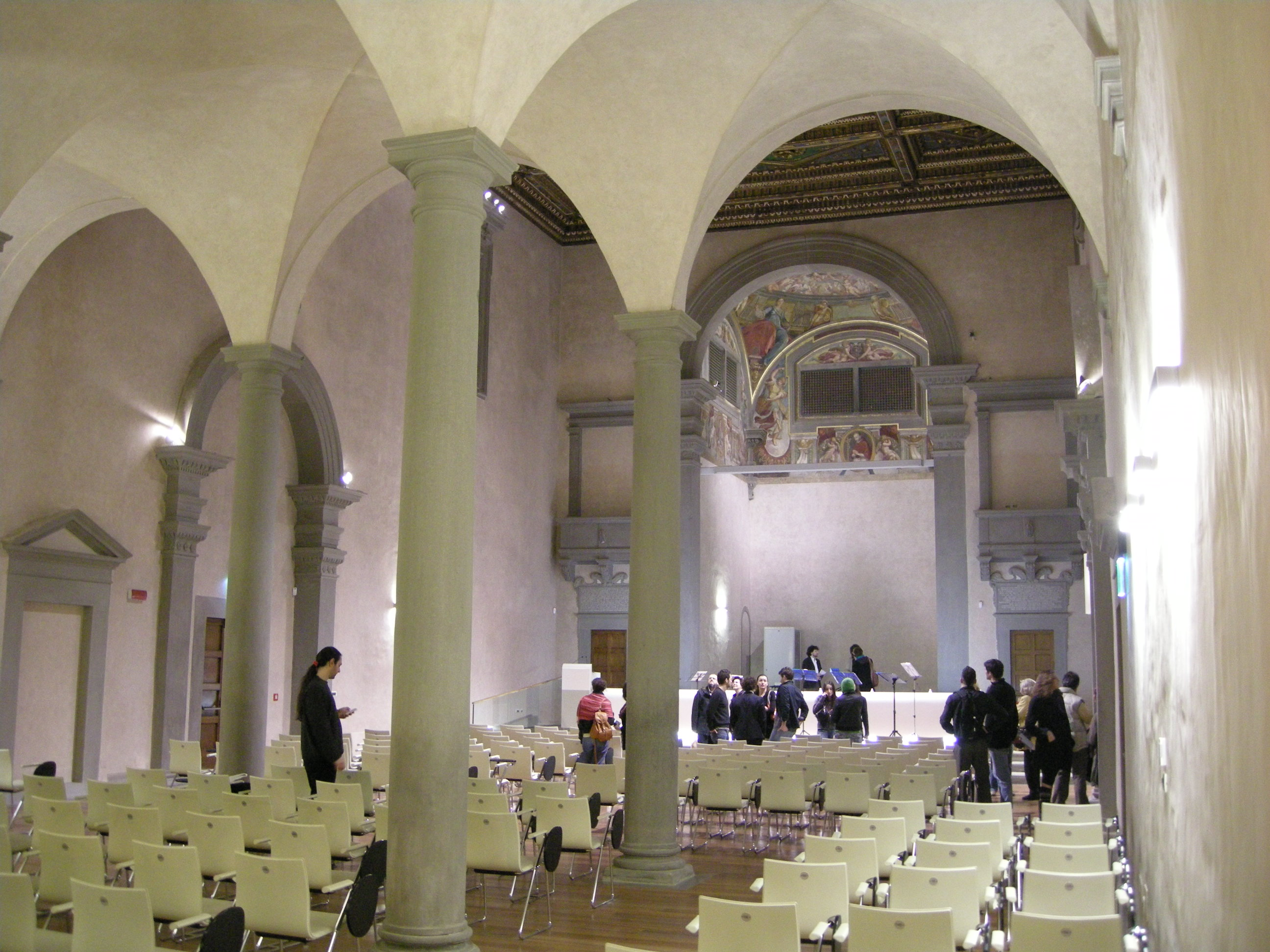 Sant'apollonia, chiesa